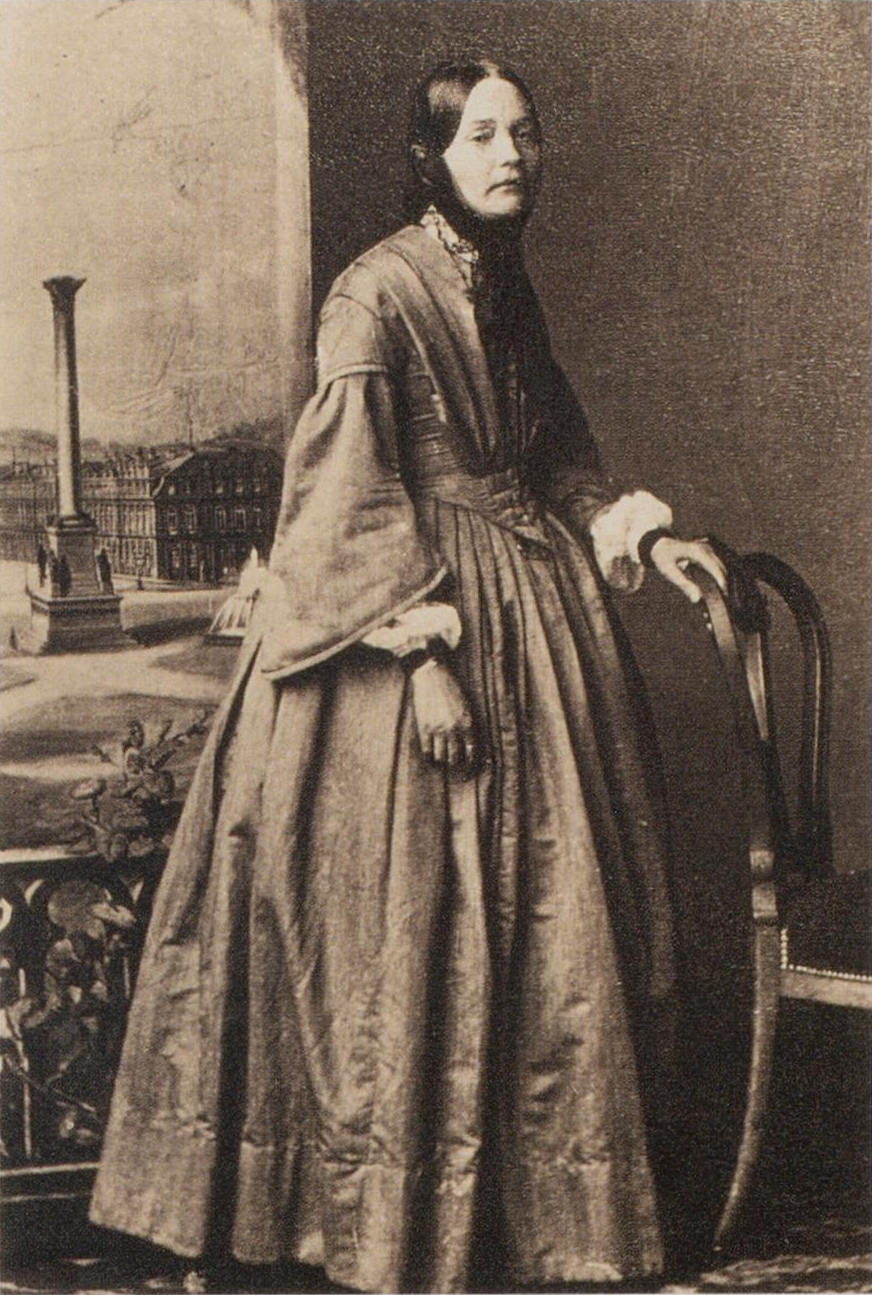 Julie Eyth vor dem Schlossplatz in Stuttgart, vor 1884, Städtisches Museum im Kornhaus, Kirchheim unter Teck.